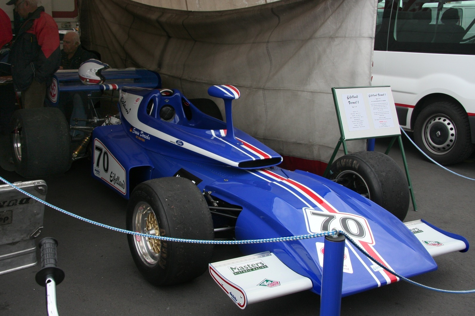 Eifelland-March E21 von Luigi Colani (nach Umbau), ausgestellt beim AvD-Oldtimer-Grand-Prix